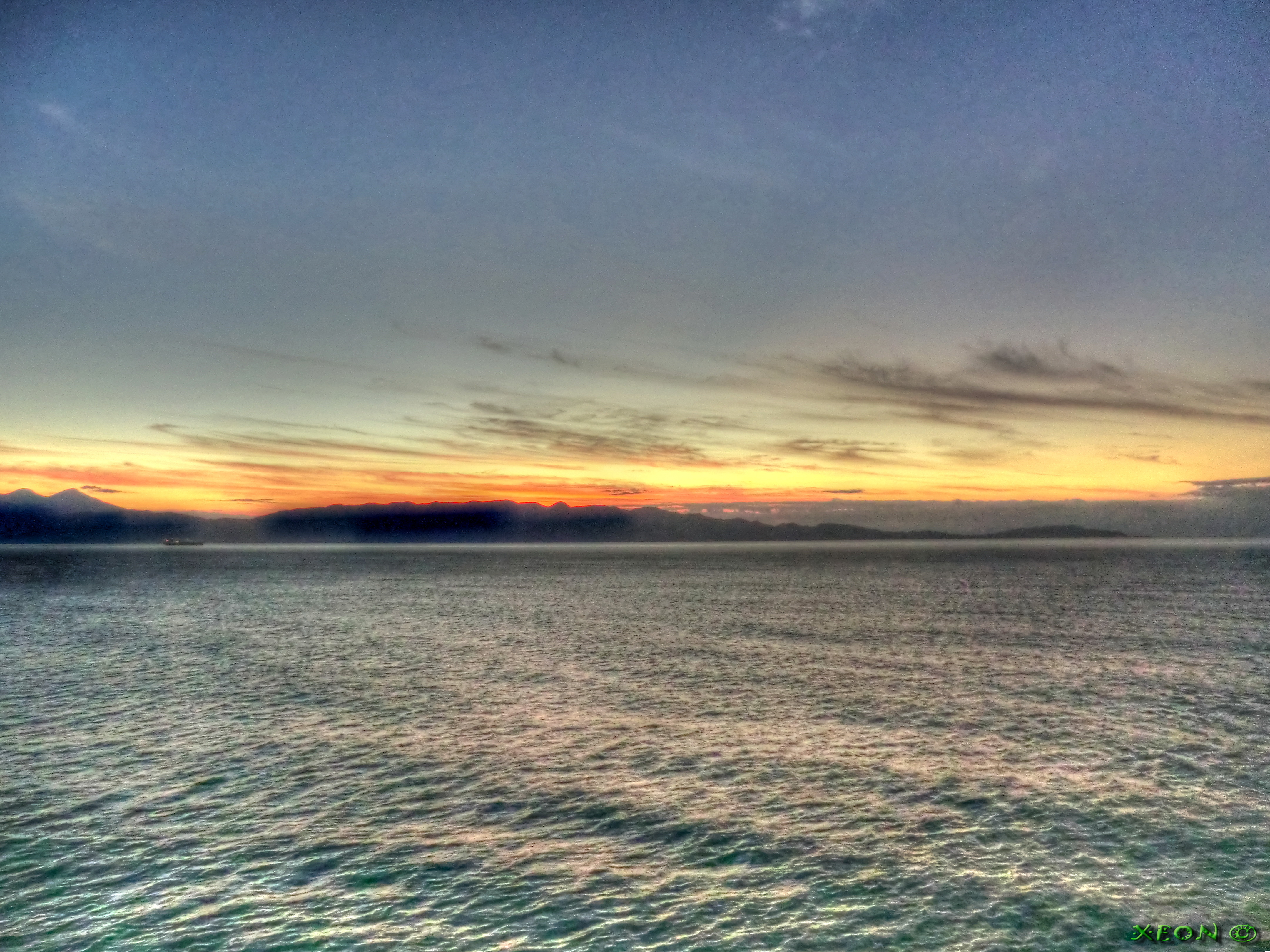 Plasma